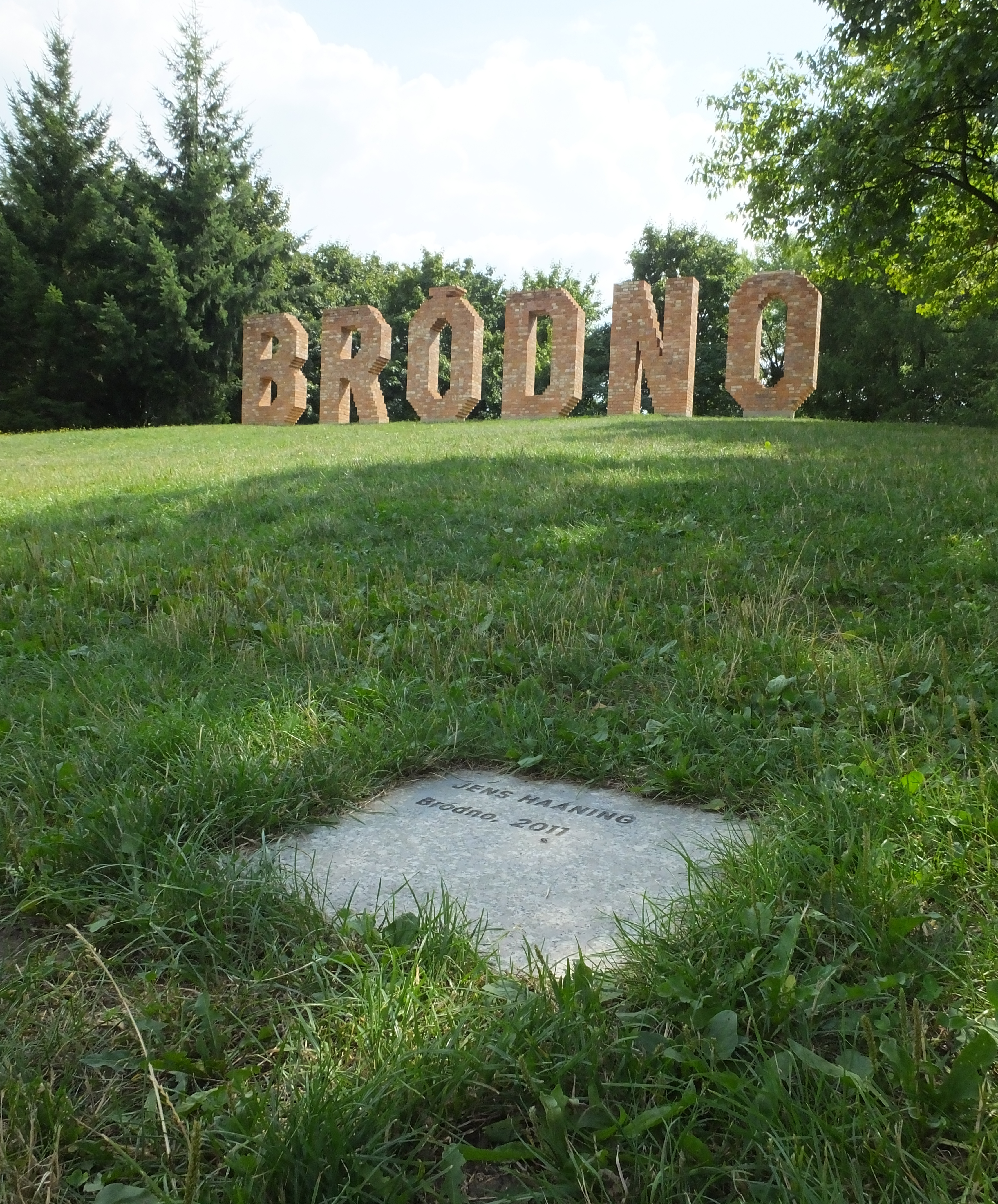 Bródno – jedna z rzeźb w Parku Rzeźby na Bródnie. Autor: Jens Haaning. 2012.